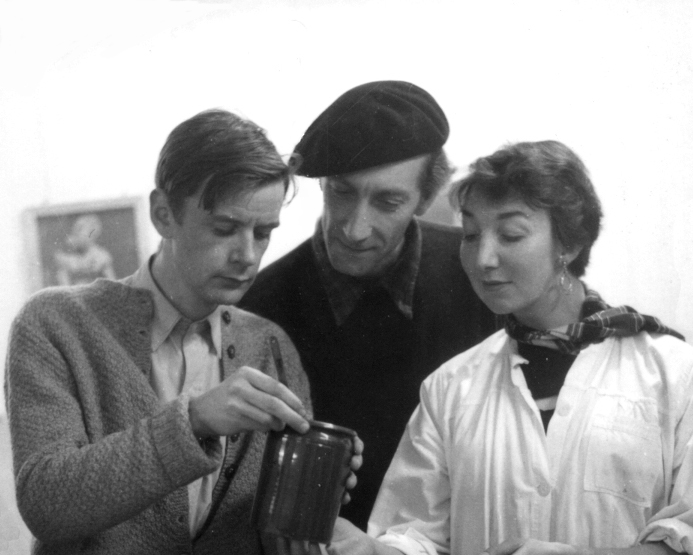 Maleren Lars Tiller og billedhuggerne Kristofer Leirdal og Edith Aas